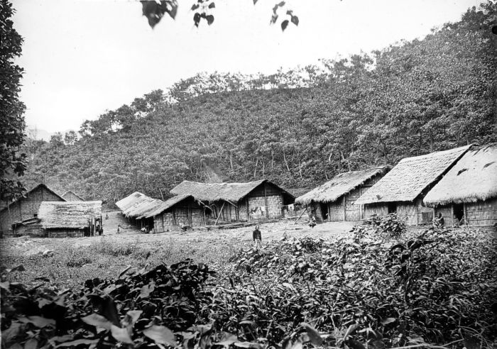 Lichtbeeld. Dorp voor arbeiders van een onderneming op Java